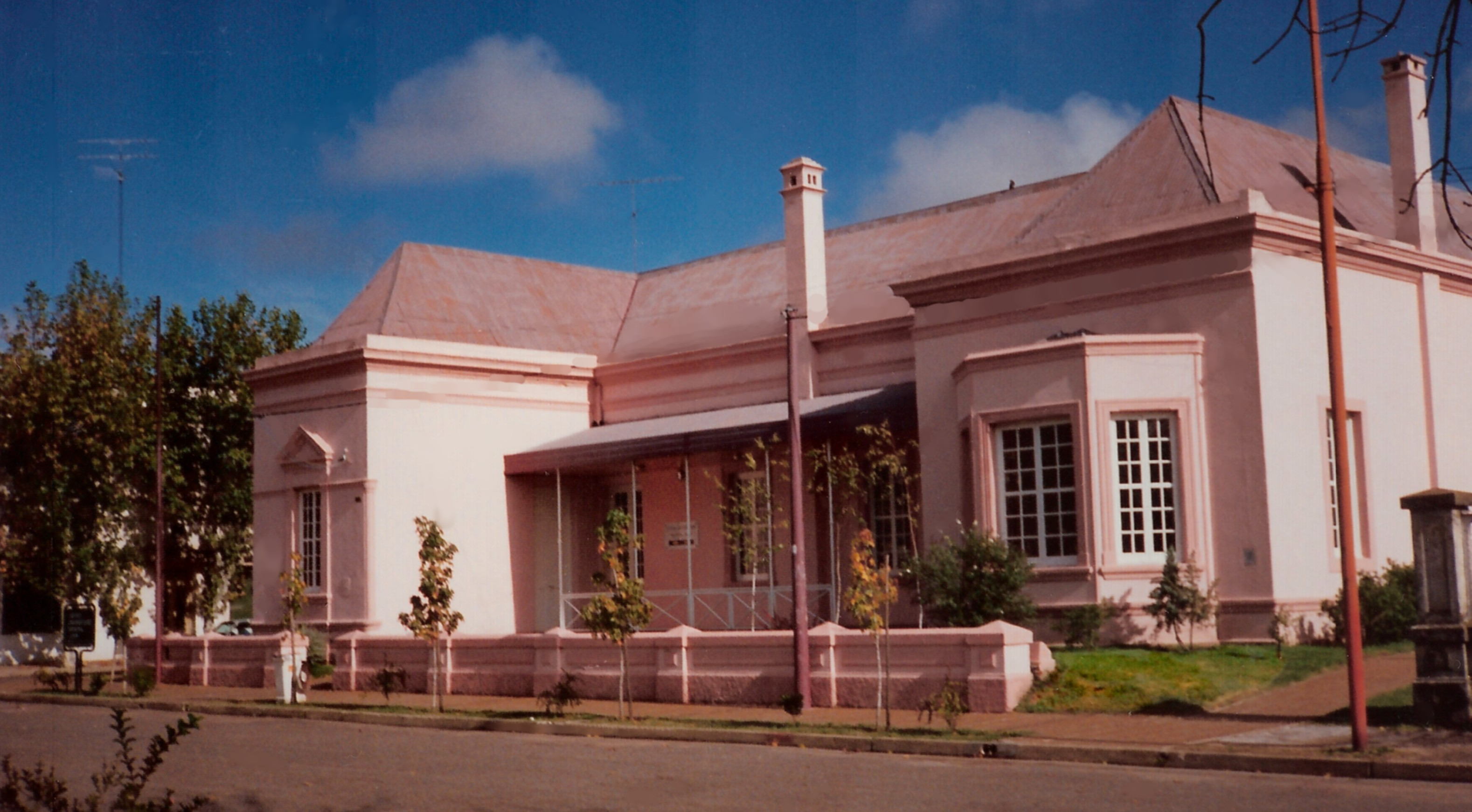 Antiguo Club Inglés y ex-Rectorado de la UNNOBA (Universidad Nacional del Noroeste de la Provincia de Buenos Aires), en Junín, Argentina.